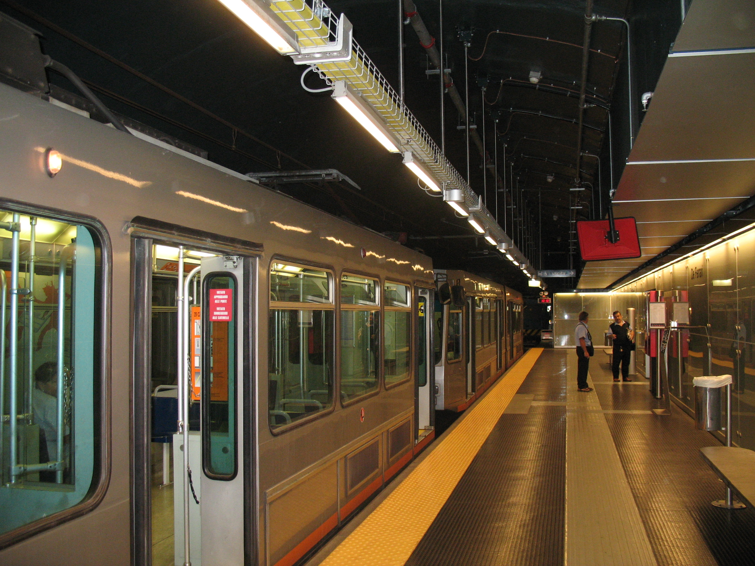 Metropolitana di Genova